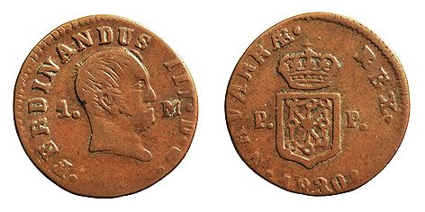 Moneda d'un marabatí acuñada a Pamplona en 1830, durant el regnat de Ferran VII. Fabricada en coure, porta les llegendes: a l'anvers “FERDINANDUS III D.G.” i en el revers “NAVARRÆ REX”.